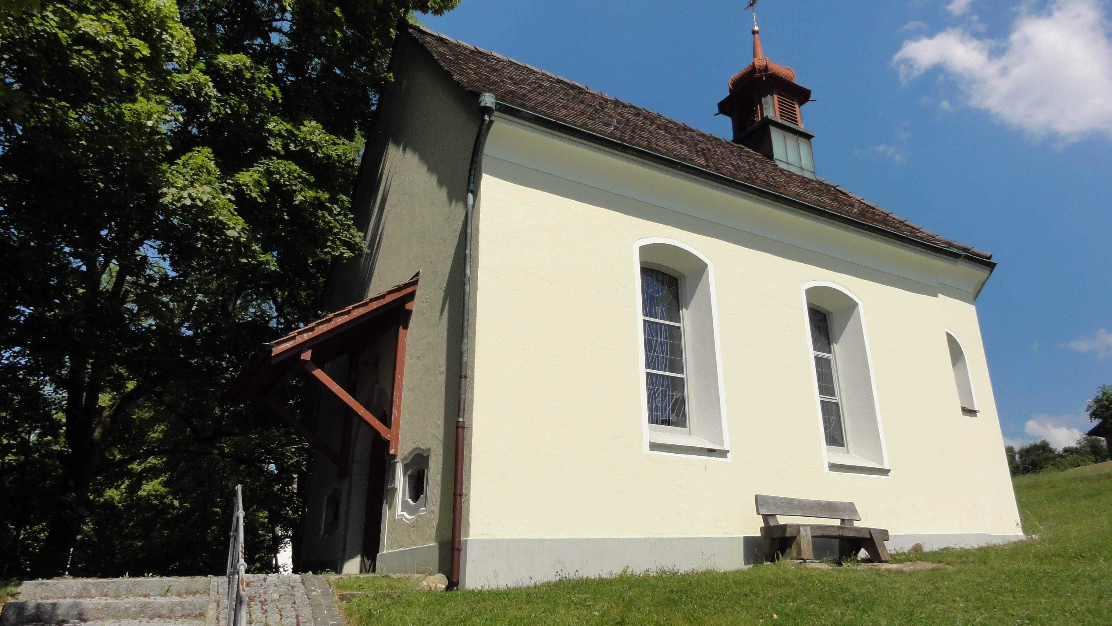 Kapelle Maria Einsiedeln, St. Gallen